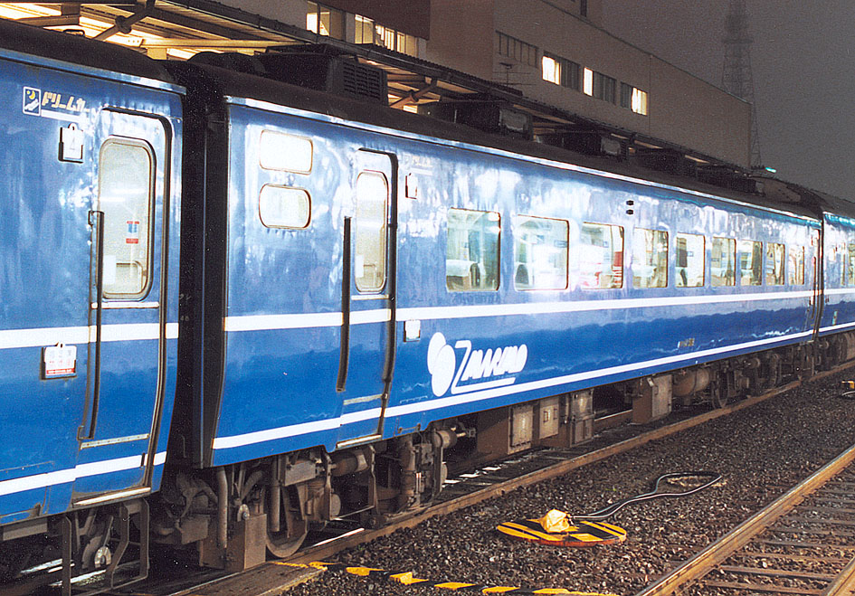 JR北海道 14系500番台座席車 ドリームカー